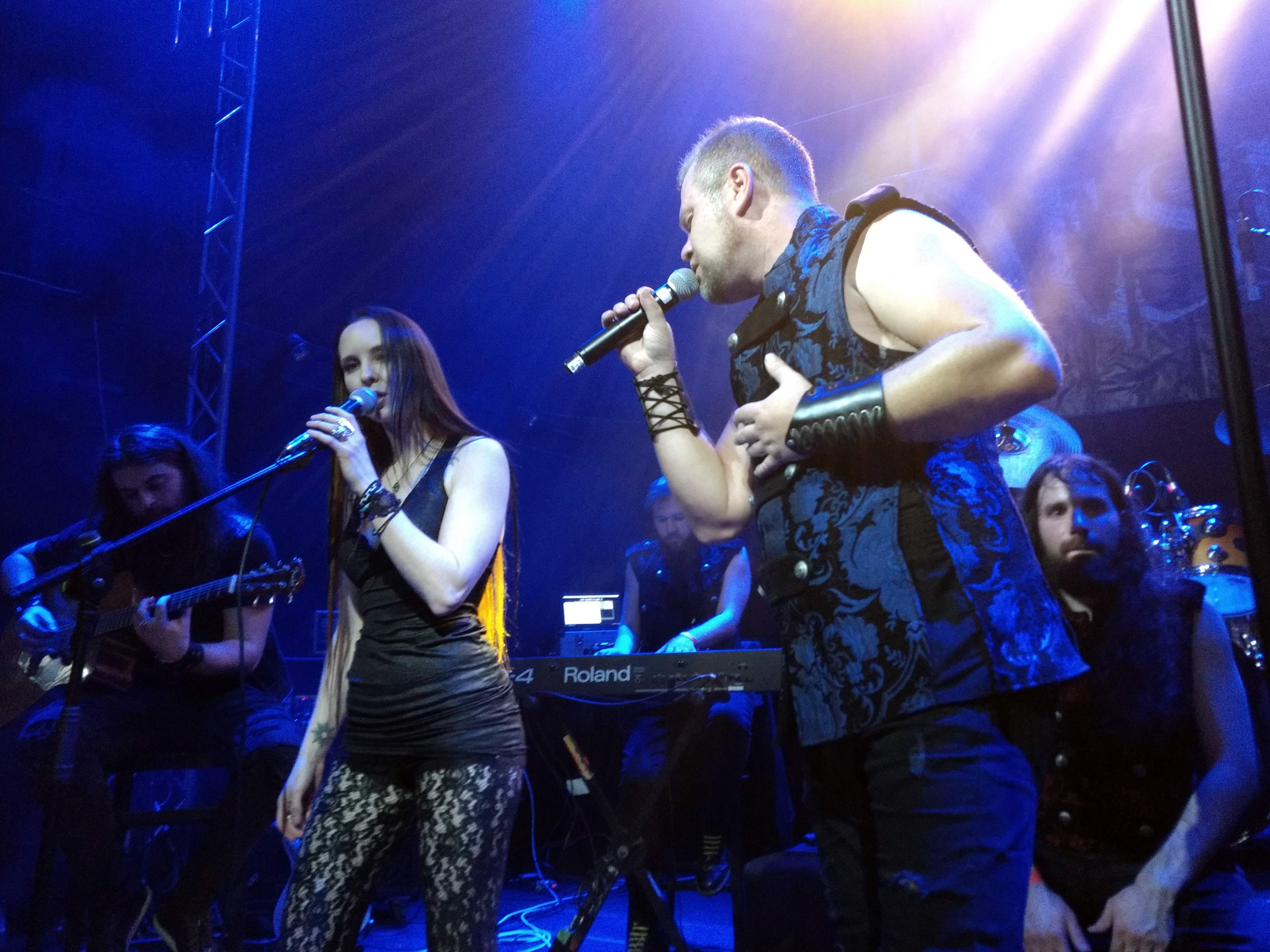 Infy Snow and Desert